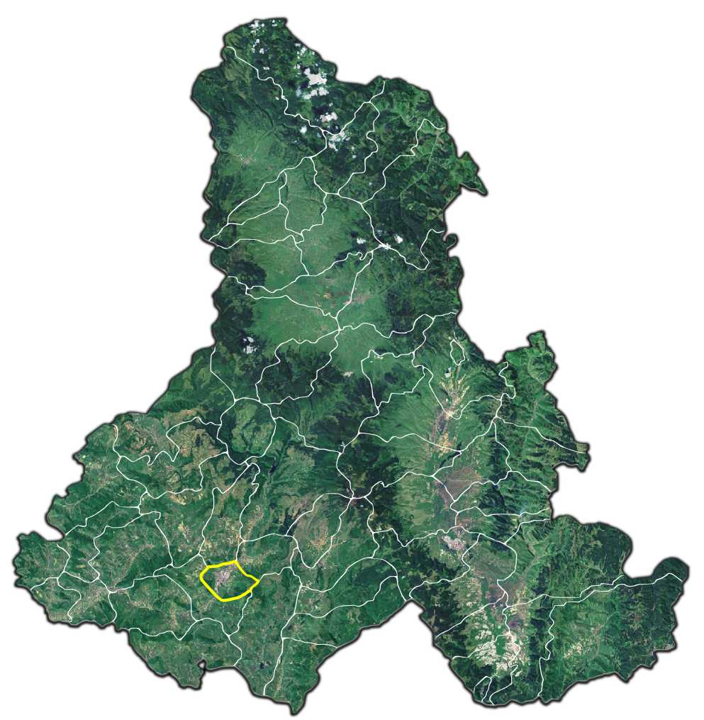 Odorheiu Secuiesc jud Harghita